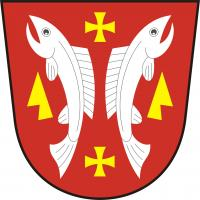 Karlovice (ZL), vlajka